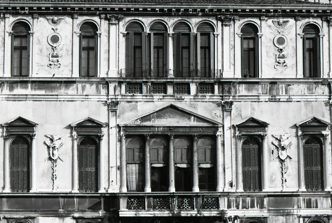 Servizio fotografico : Venezia, 1977 / Paolo Monti. - Strisce: 6, Fotogrammi complessivi: 34 : Negativo b/n, gelatina bromuro d'argento/ pellicola ; 35 mm. - ((Sul portanegativi: N[I]K[MA]T FP4 e iscrizione didascalica manoscritta a penna nera "arch. Colussi [sic] [...]". - :. - 3-11; 14-16; 36 = Palazzo Corner Spinelli, esterno: vedute e particolari;. - 12-13; 17-18; 20-35 = Palazzo Contarini dalle Figure, esterno: vedute e particolari. - 19 = Decorazione scultorea di un palazzo non identificato. - Occasione: Pubblicazione (Electa, 1977). - Fonte: Agenda di Paolo Monti: Leica 1501-3000 Controllo numerazione (1950-1978), presso Archivio Paolo Monti. - Fonte: Fattura di Paolo Monti: IV. Commesse/ Fattura n. 05/ Fotografie per volume architetto veneziano Codussi - Prof. Puppi (1977/03/31), presso Archivio Paolo Monti. - Fonte: Monografia di Olivato Loredana, Puppi Lionello: Mauro Codussi, Milano, Electa (1977)